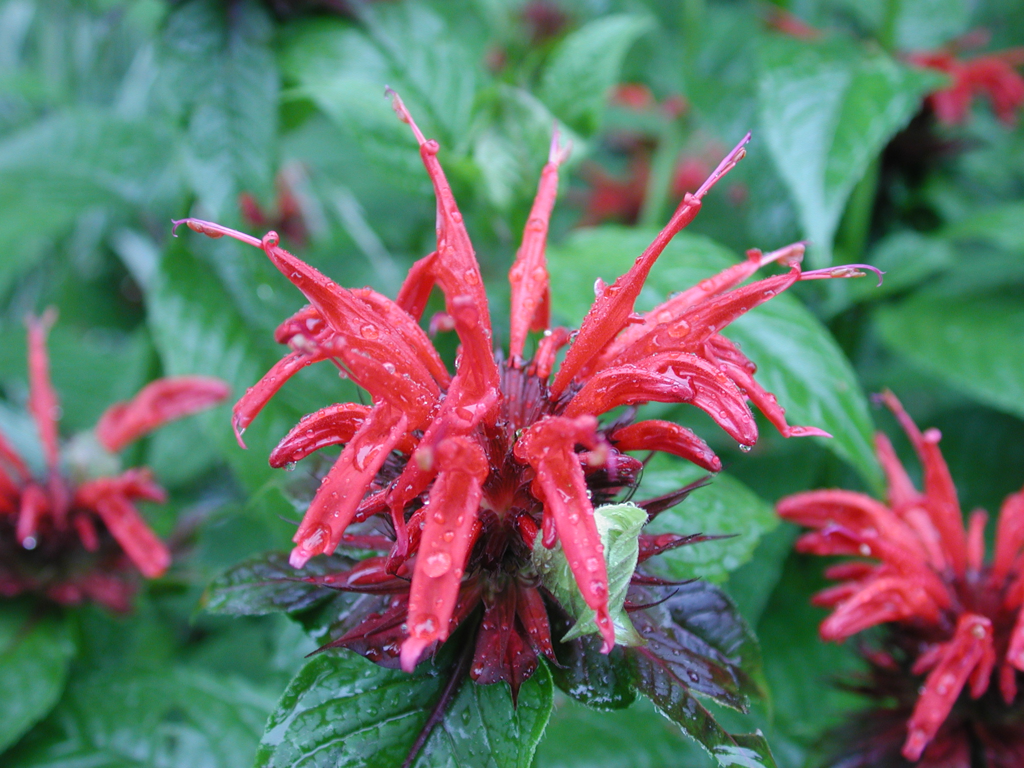 Goldmelisse aufgenommen am 1.7.2005 Wolfgang Wallner